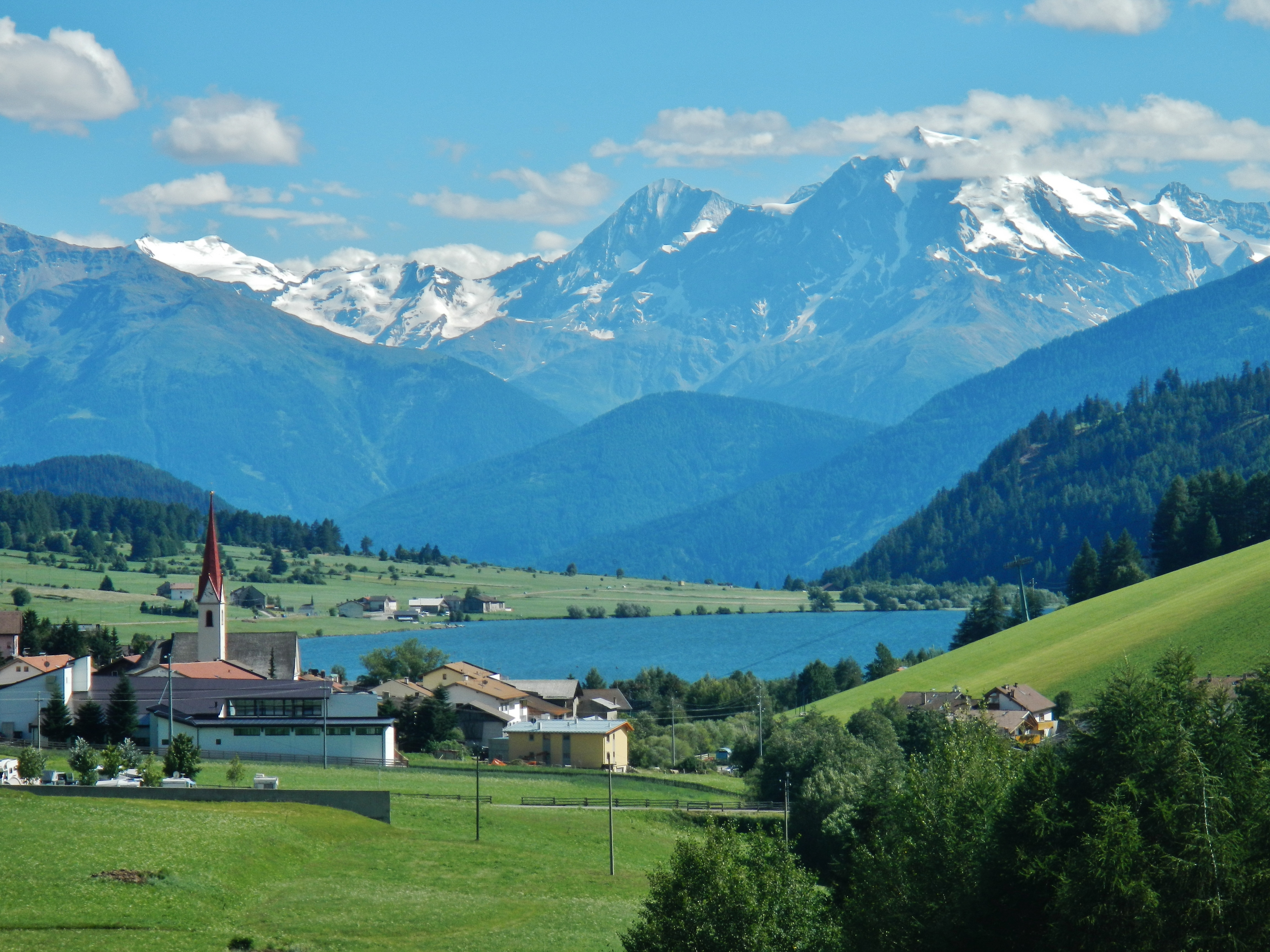 Vinschgau mit Blick zum Haidersee, Lago della Muta